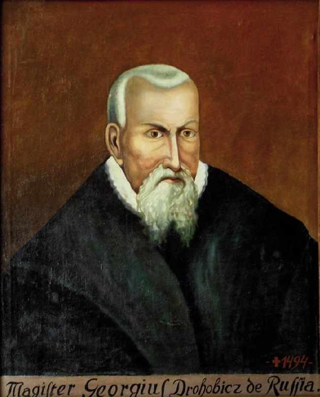 Magister Georgius Drohobicz de Russia; магістер Георгій Дрогобич з Русі